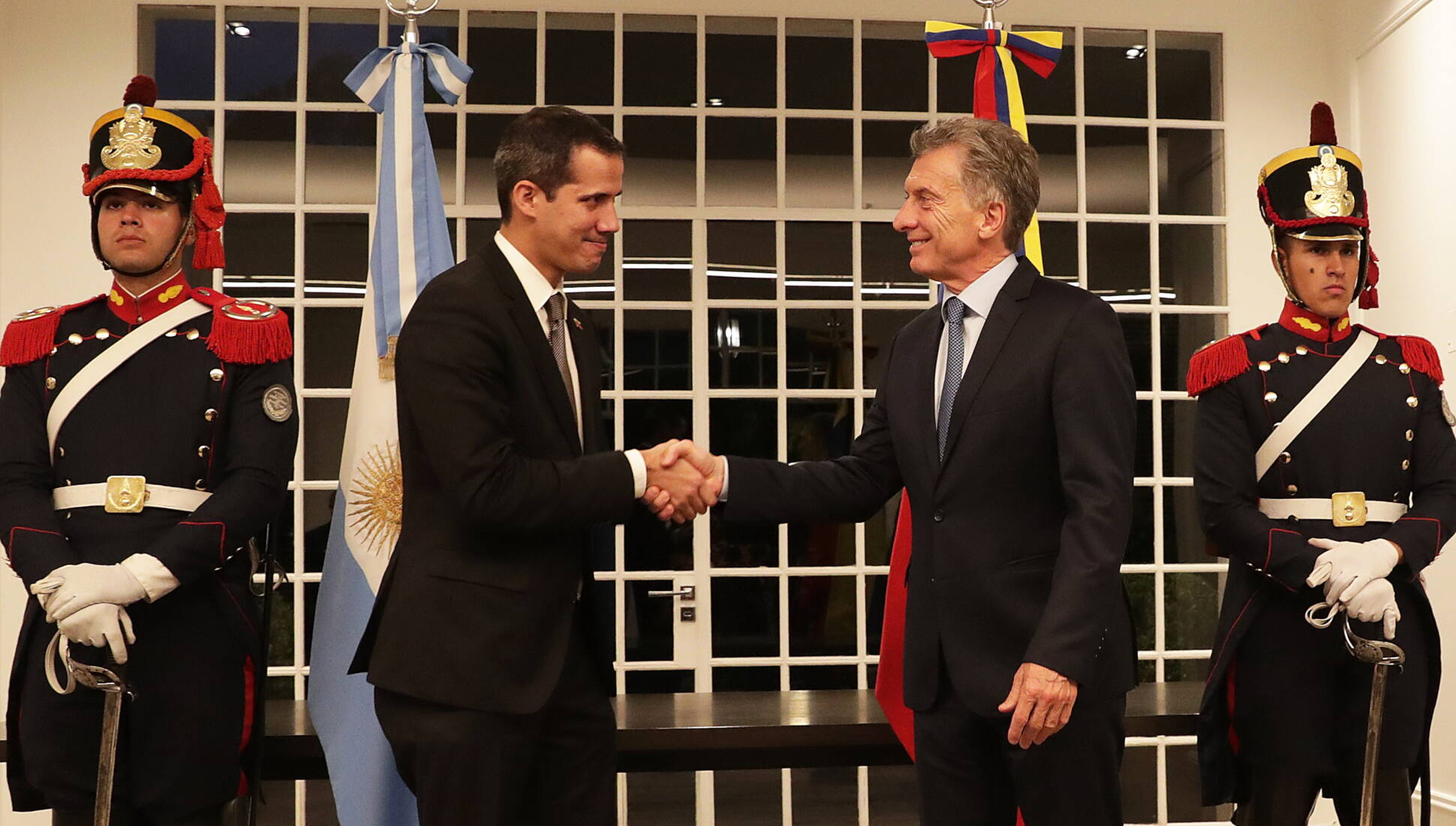 El presidente Mauricio Macri recibió en la residencia de Olivos al presidente encargado de Venezuela, Juan Guaidó.